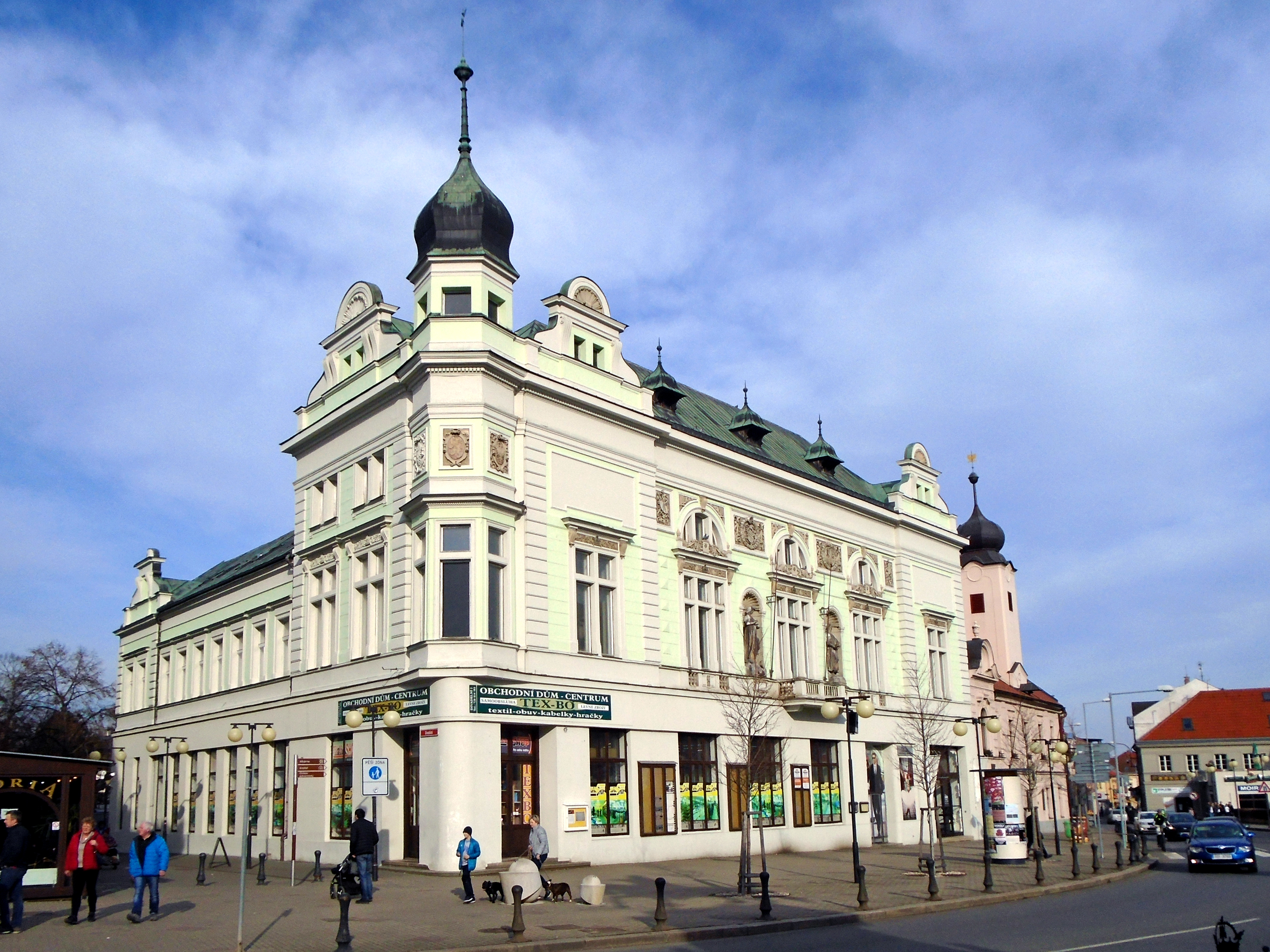 Záložna.